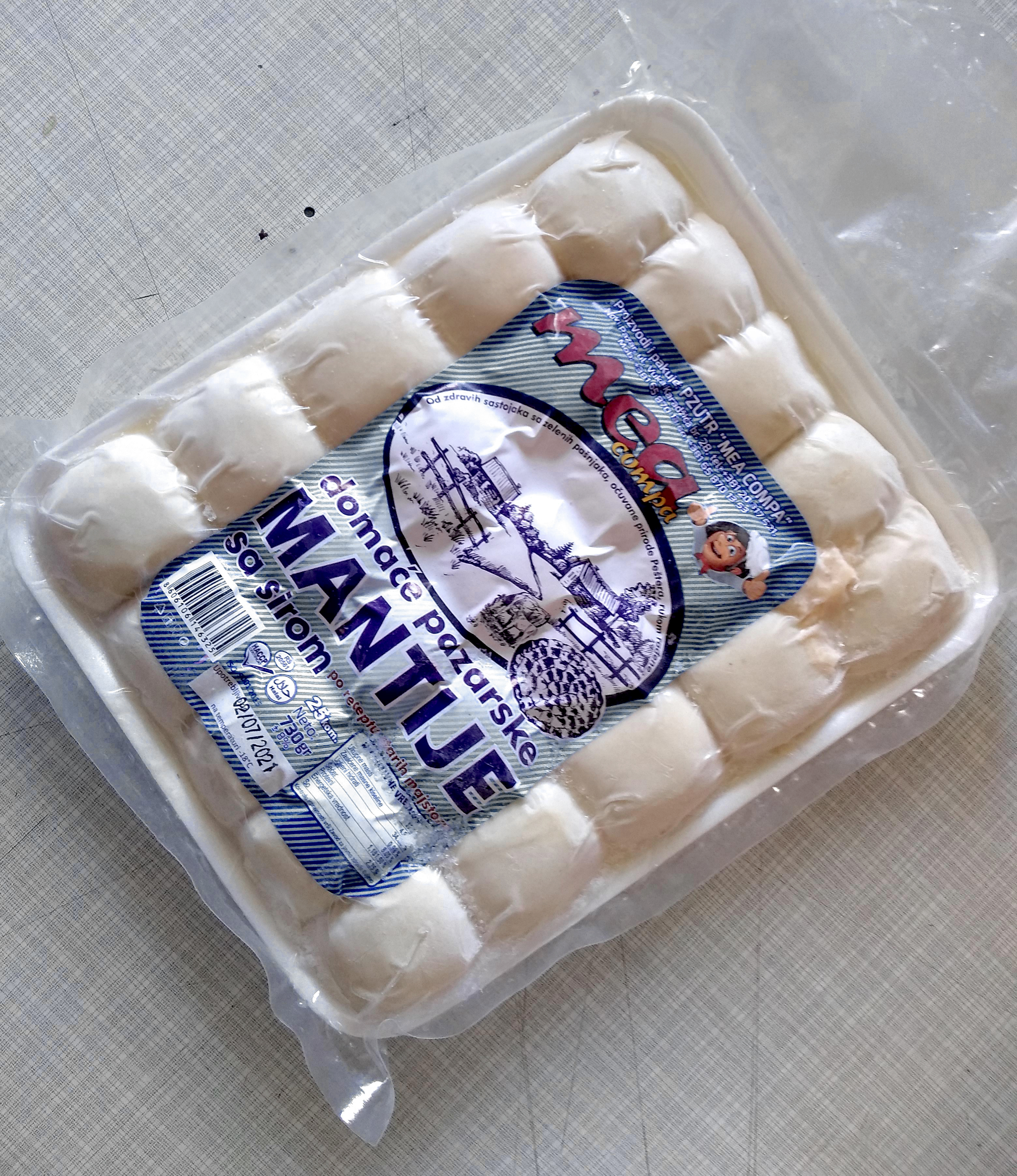 Srpski (latinica): Pazarske mantije - polugotove, zamrznute, plasiraju se na tržište